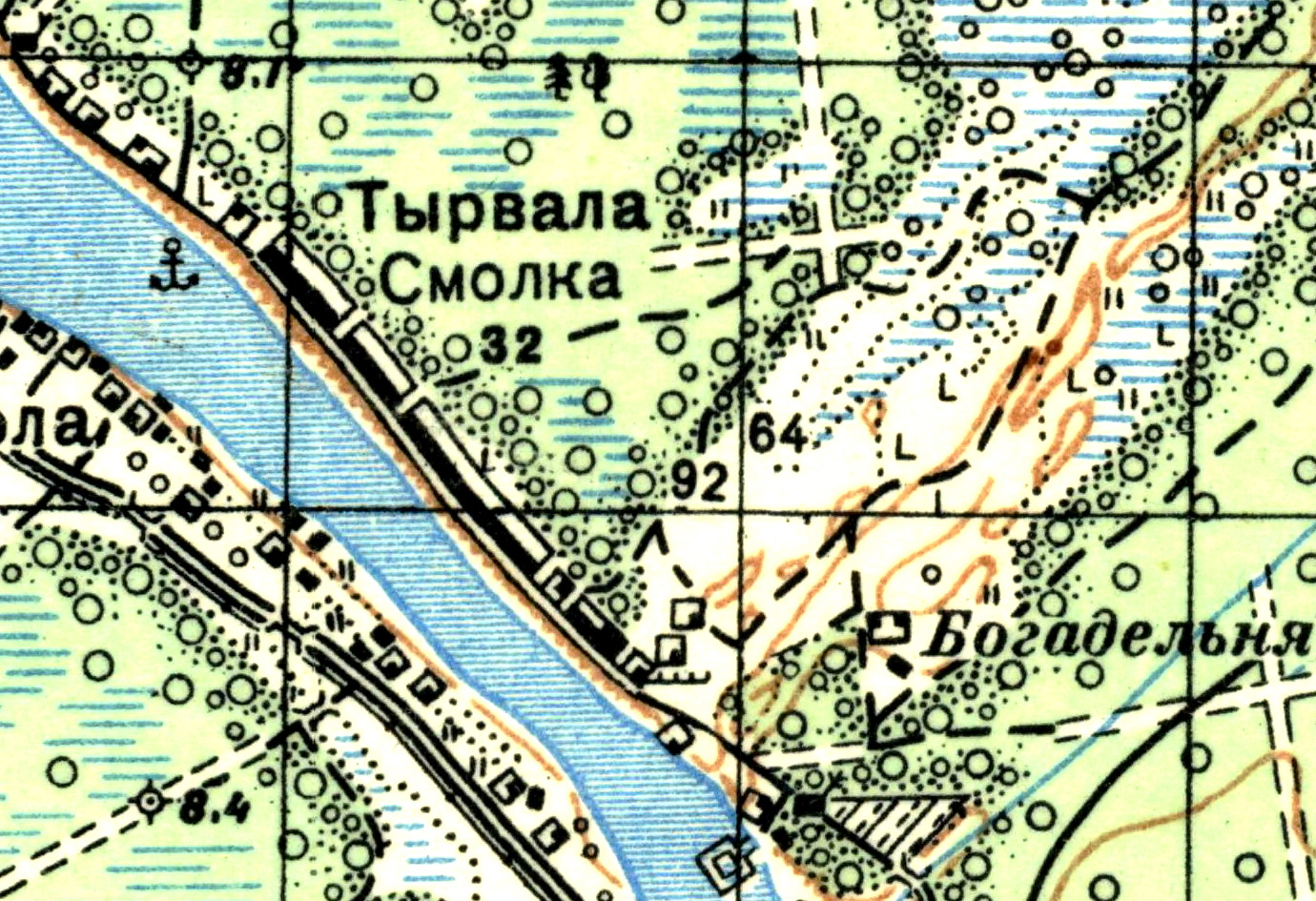 Топографическая карта Ленинградской области, квадрат О-35-21-В (Нарва), деревня Смолка